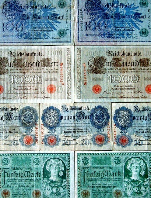 Banknoten - Deutsches Reich - 1908 - 1910 - 1914 - 1920